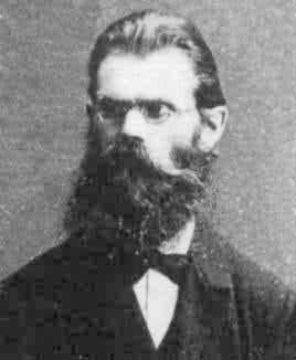 Foto di Theodor Reye